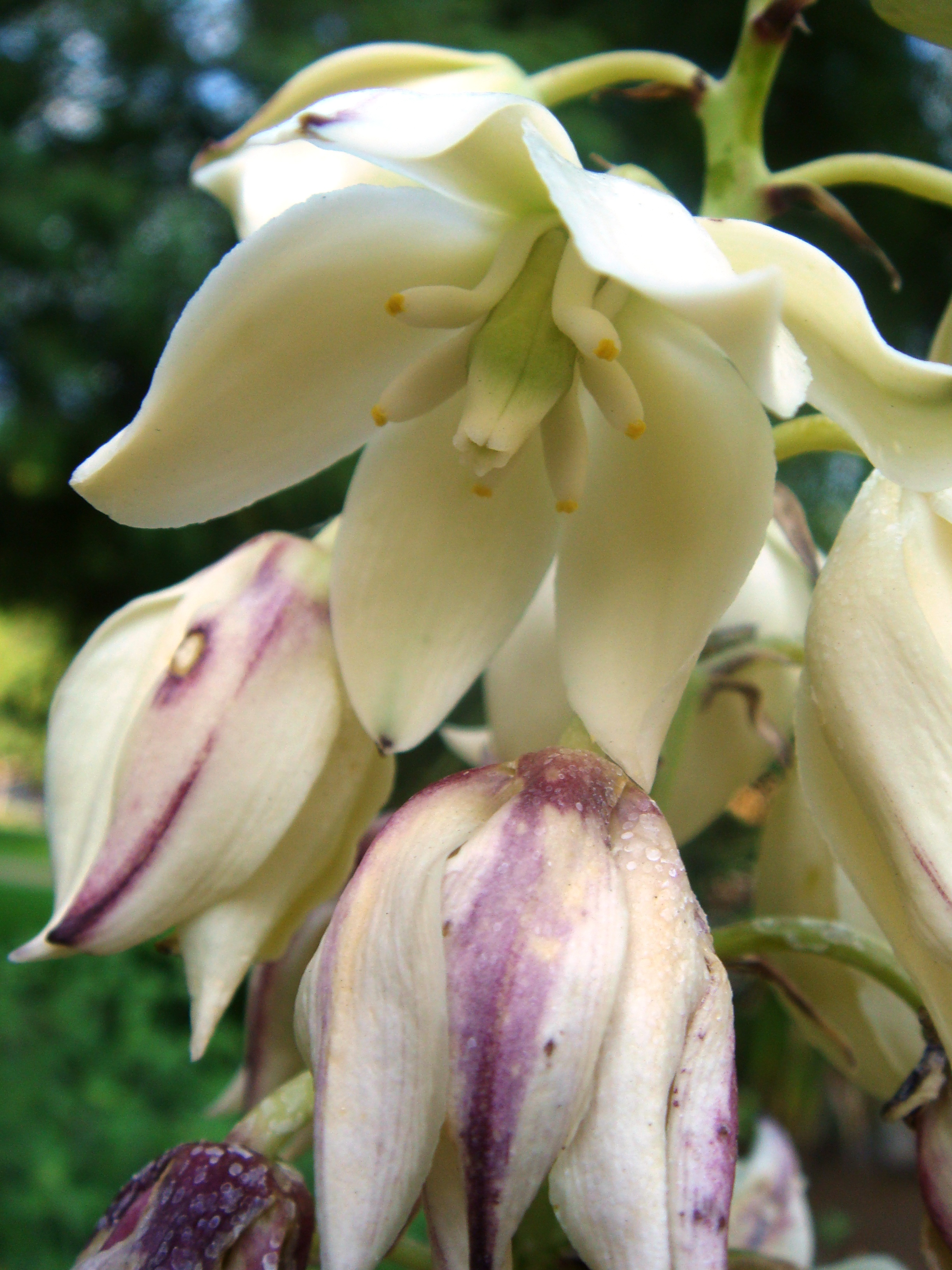 Yucca aloifolia, cultivated, Arizona State University, Tempe, Arizona